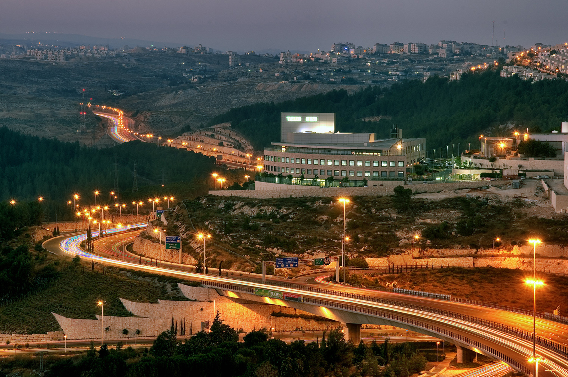 zona industrial alrededor de jerusalem, camino a ramot